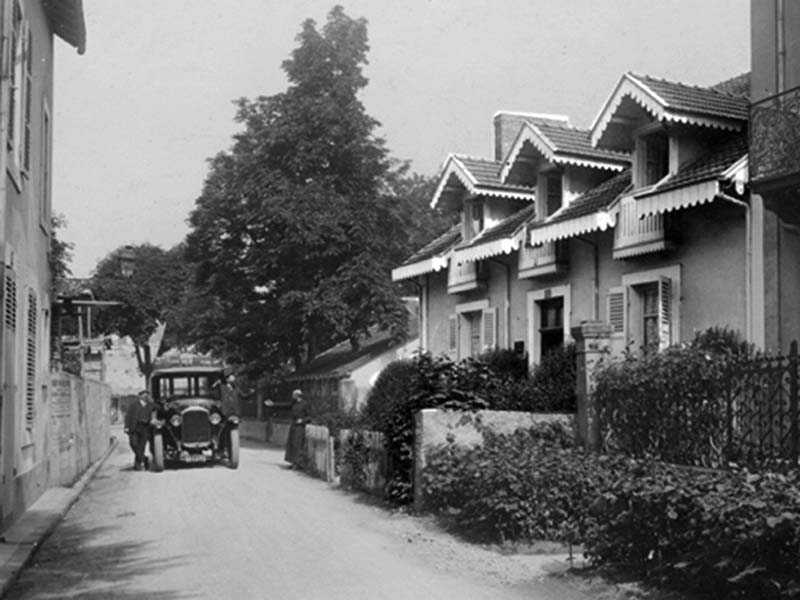 La première Maison du Missionnaire rue Mounin à Vichy (Allier, France), "la villa du bon Samaritain".